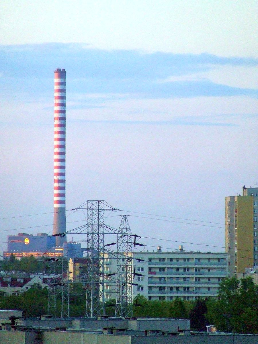 Kawęczyn power plant, Warsaw